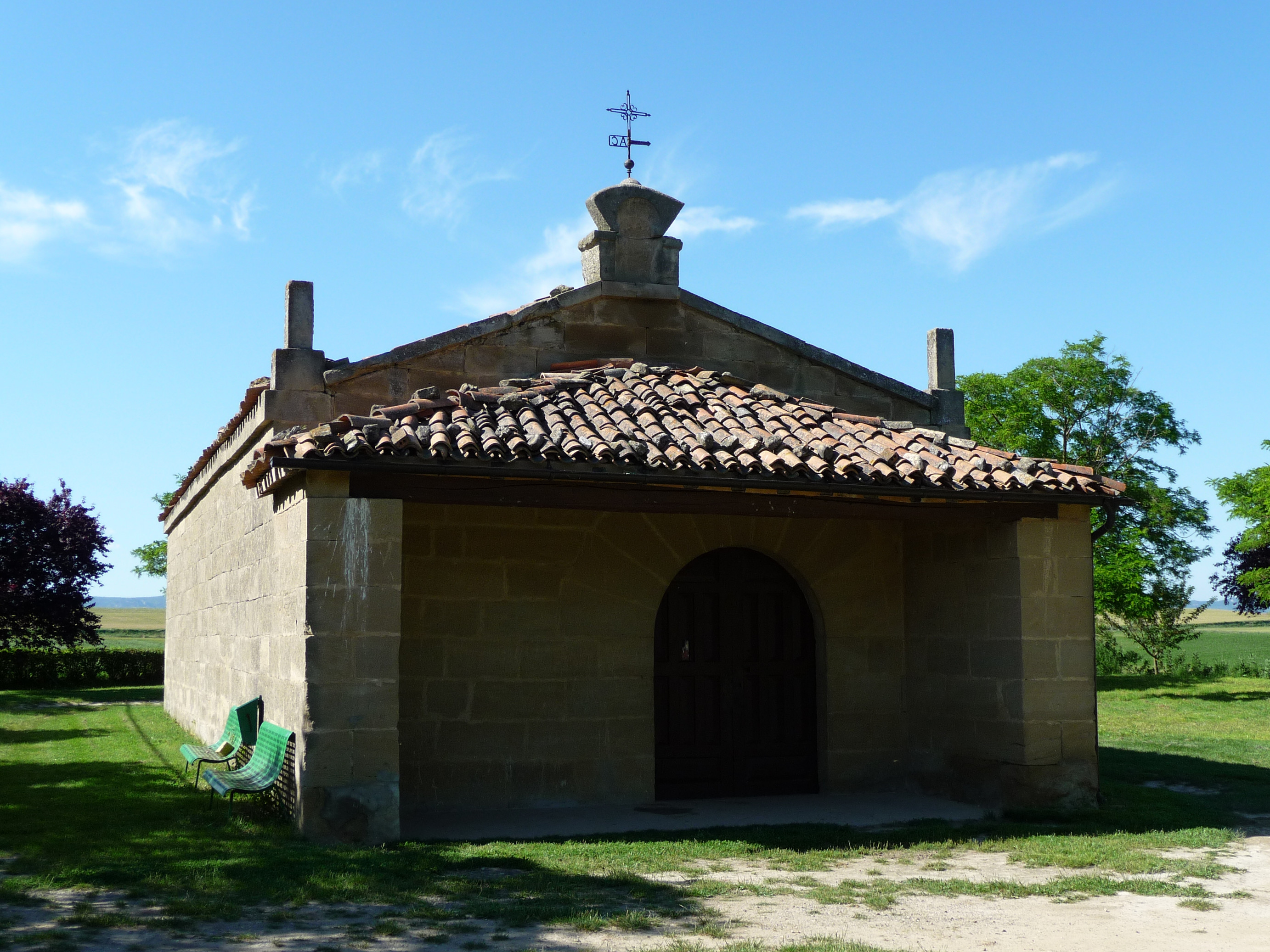 Ermita de San Isidro - Herramélluri. La Rioja (España)